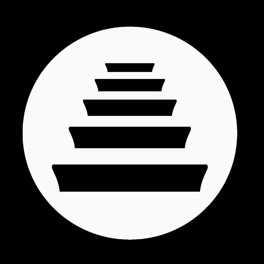 Logo oficial del Quinto Escalón